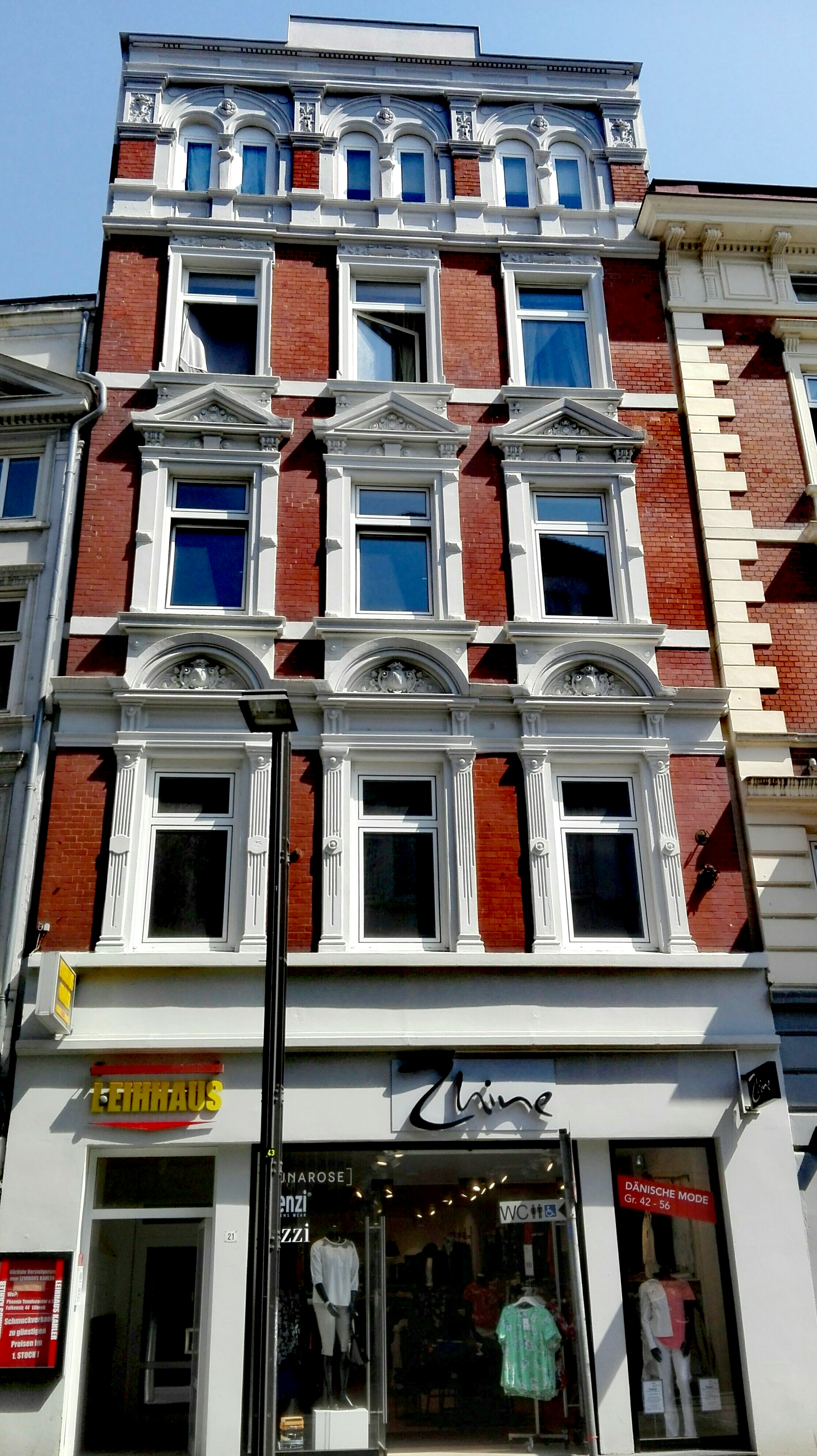 Ehemaliges Kontorhaus der C. F. Schütt & Co. in Lübeck.